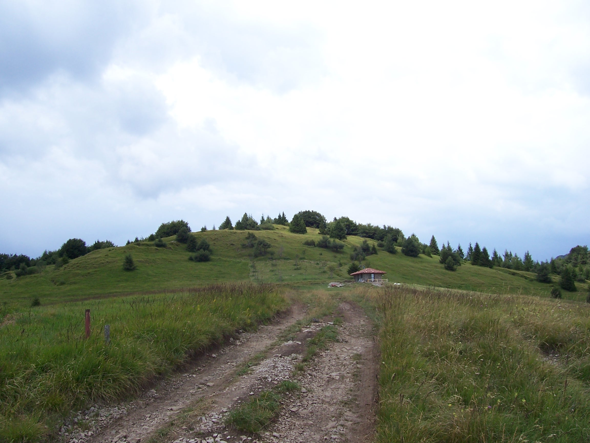 Sommità del Monte Stino nel comune di Capovalle (Brescia)